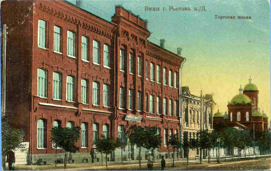 Здание торговой школы в Ростове-на-Дону. Дореволюционная открытка.